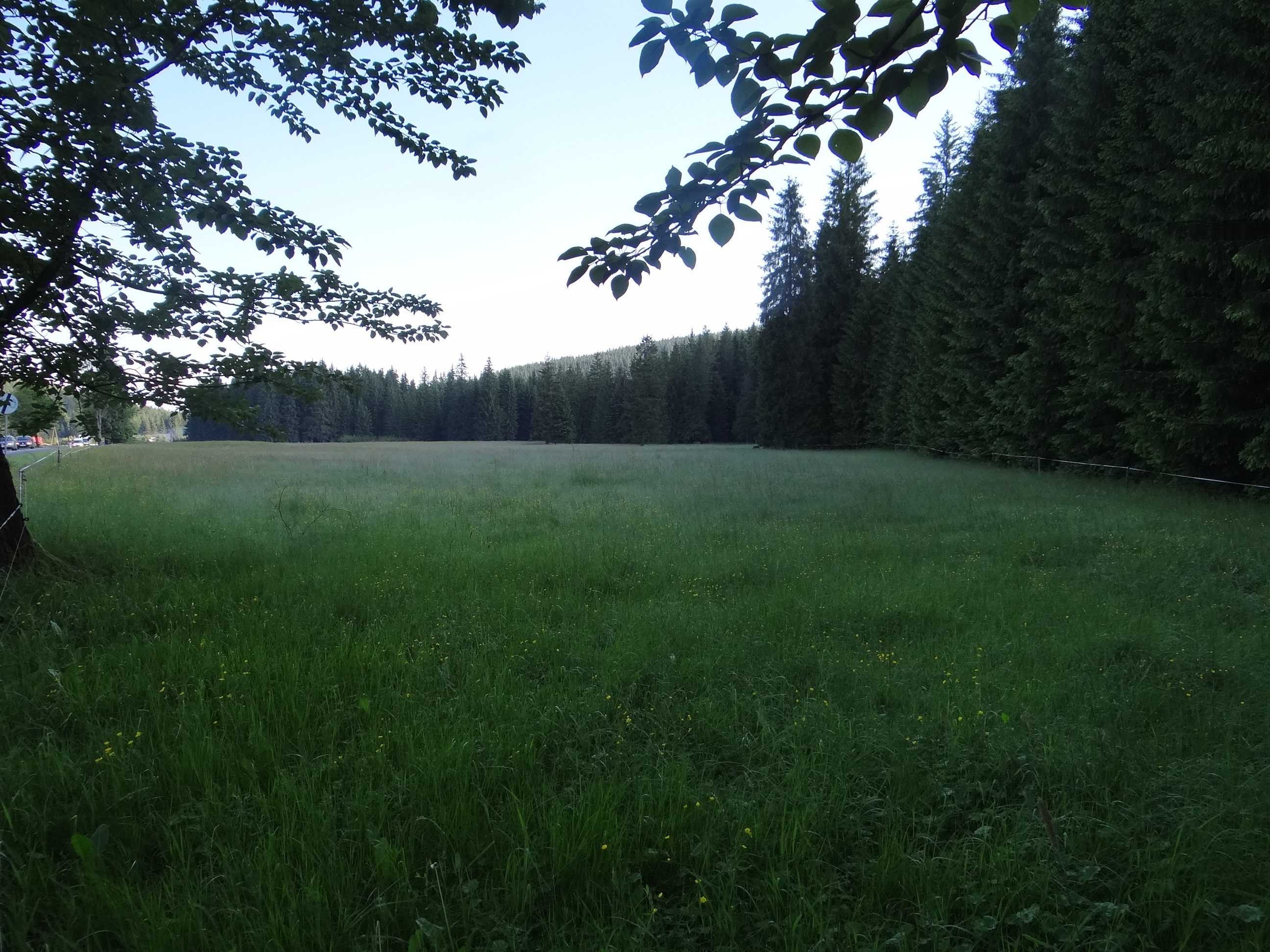 Polana Solarzówka w Witowie